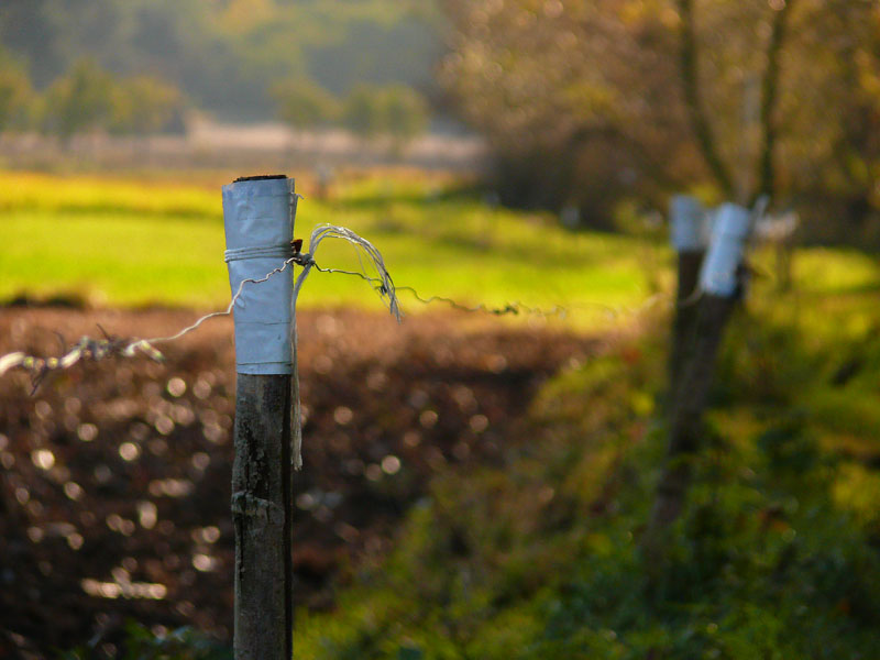 Przykład pastucha elektrycznego